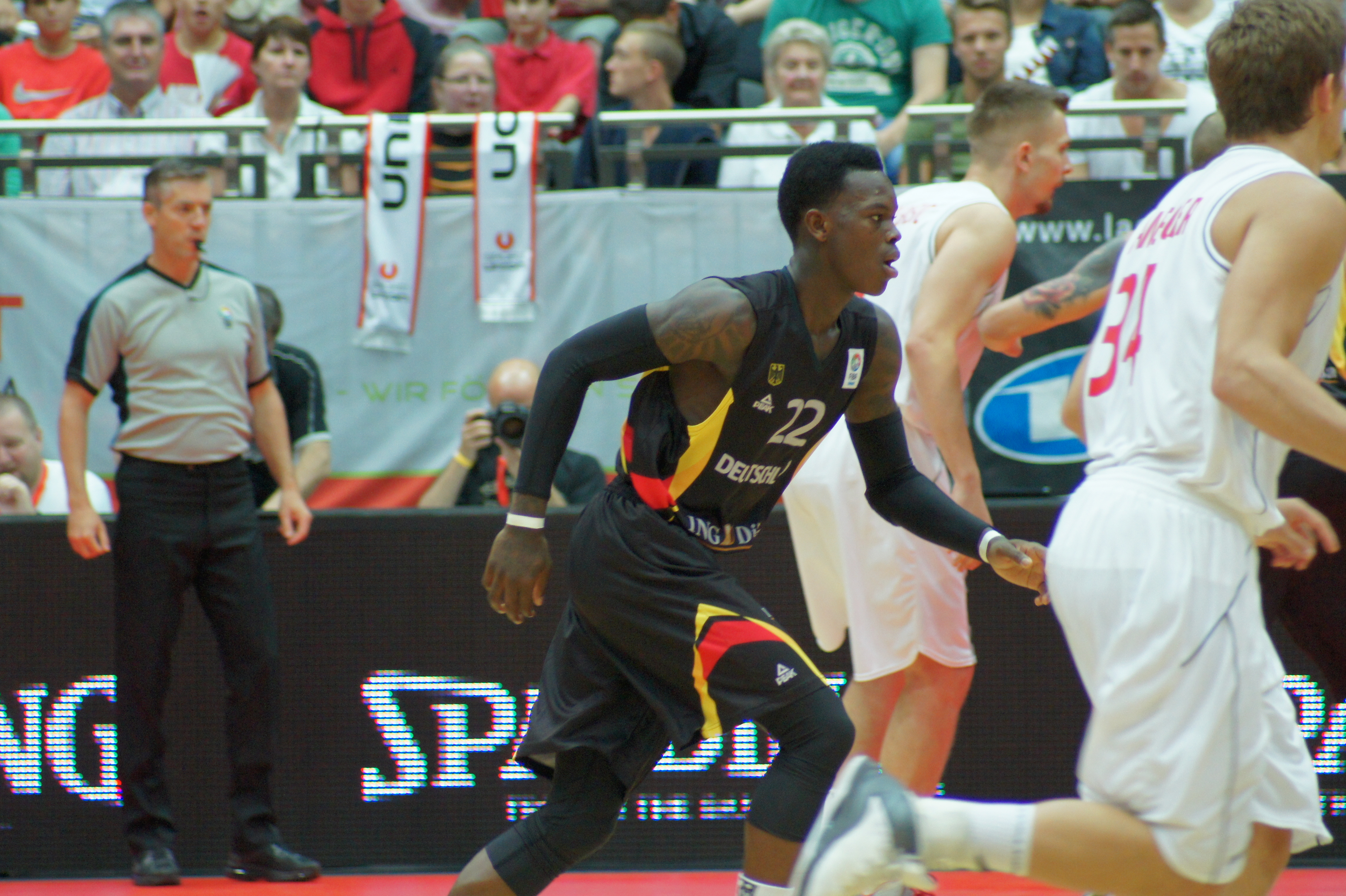 Qualifikationsspiel EuroBasket Österreich - Deutschland, 13. August 2014 im Multiversum Schwechat.